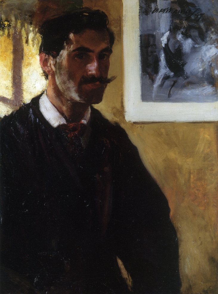 Self-portrait